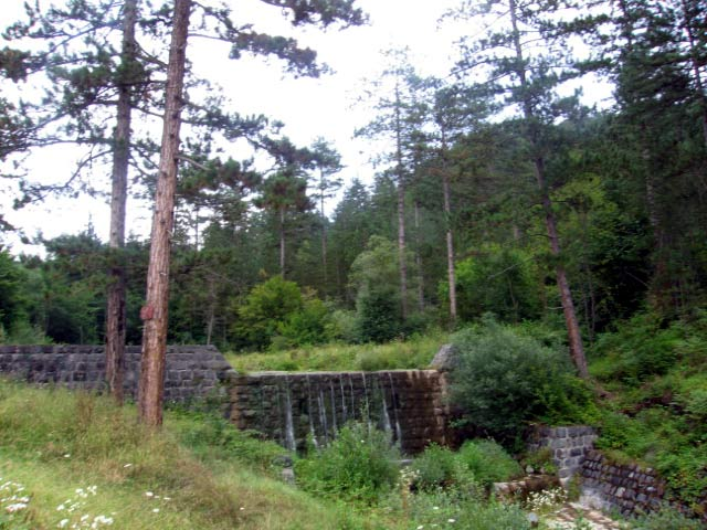 Аутор Снежана Трифуновић Фотоапарат Canon S60 Фотографисана скоро недирнута природа бање Вилина влас која се налази недалеко од Вишеграда. Обрада фотографија Adobe Photoshop 7